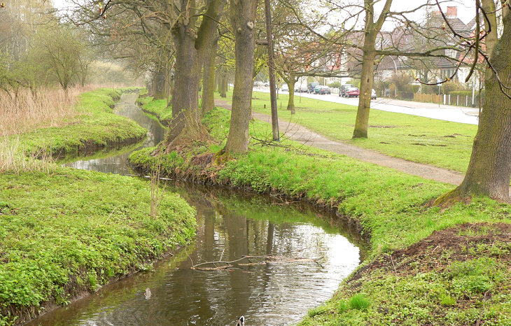 Wabe in Braunschweig-Gliesmarode